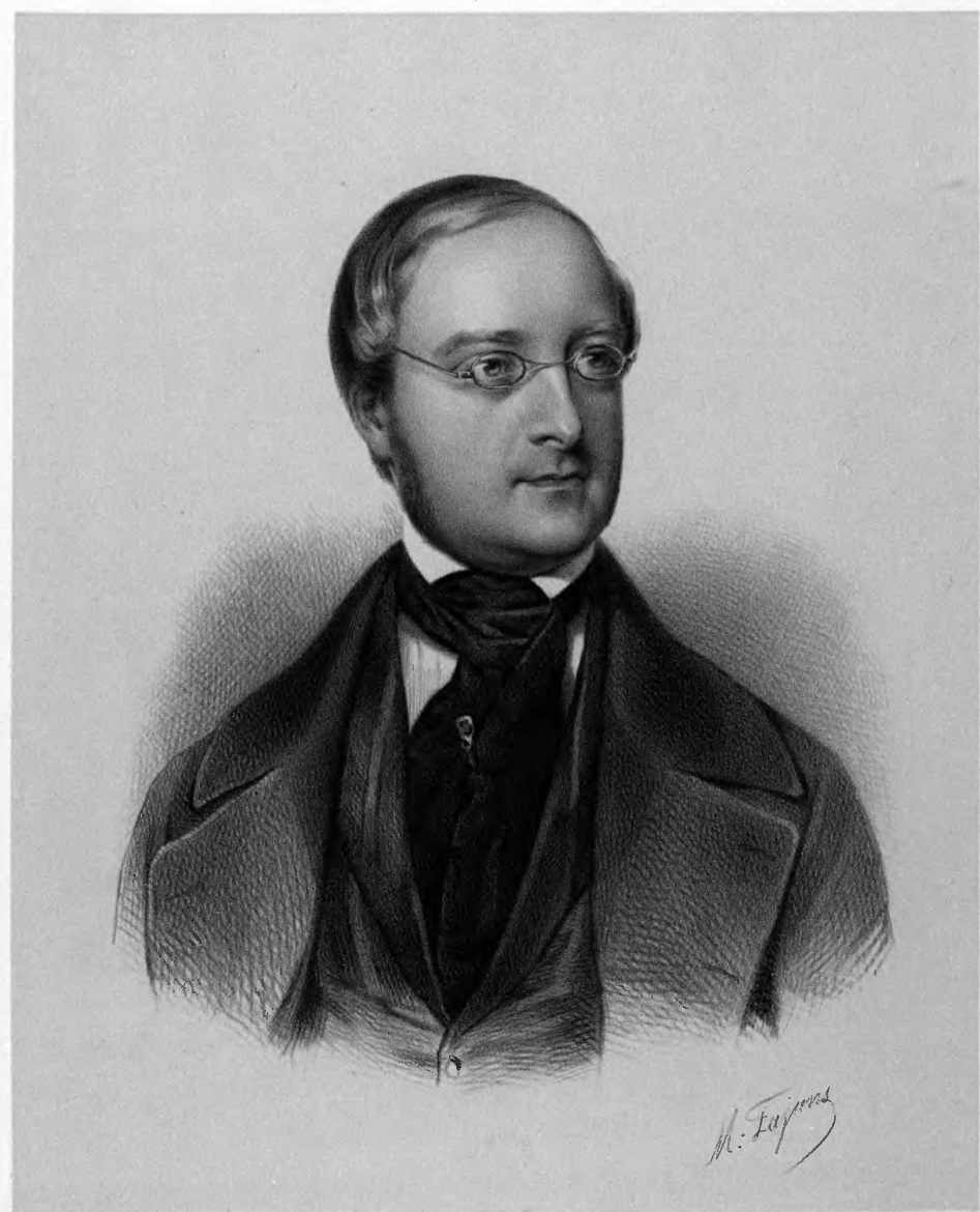 Aleksander Przezdziecki (1814-1871)